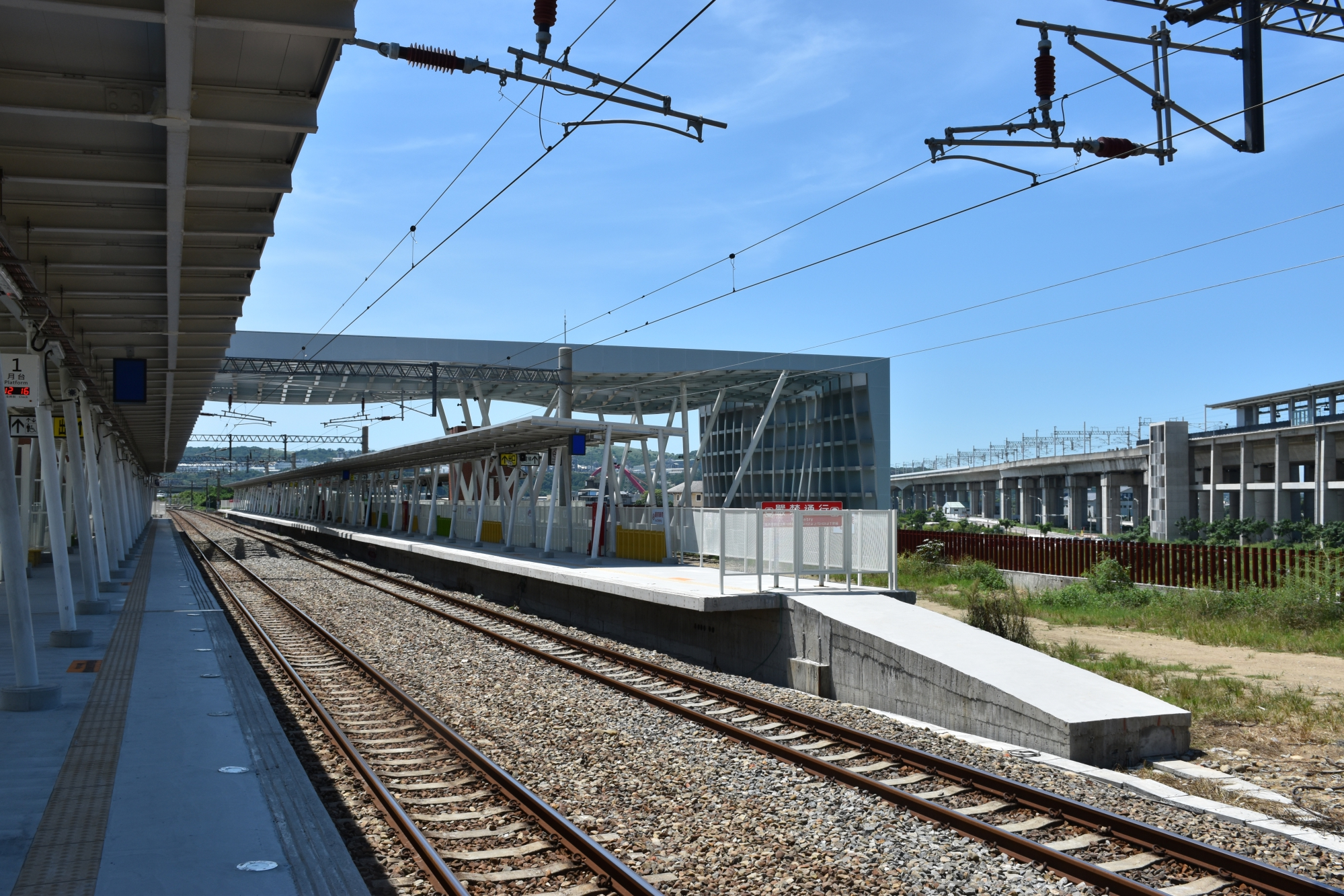 豐富車站新站之月台